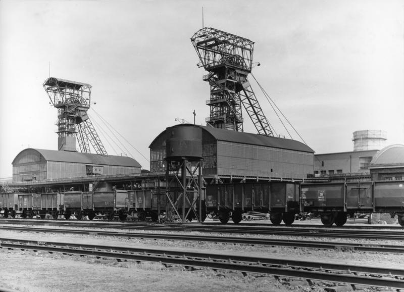 Diese Zeche ist die am weitesten im Osten liegende fördernde Schachtanlage des rheinisch-westfälischen Steinkohlereviers. Der heute 133,5 Millionen qm umfassende Grubenfelderbesitz wurde bereits vor dem Ersten Weltkrieg durch eine Doppelschachtanlage erschlossen. Die Schächte 1 und 2, die 1909 angesetzt wurden, erreichten 1910 bei 945 m Teufe das Steinkohlengebirge. Seit 1913 steht die Zeche in Förderung. Heutige Grubenabteilungen: Schacht 1/2 und Schacht 3/4 . Mit dem Abteufeln des Schachtes 5 wurde 1953 begonnen (1956 bei einer Tiefe von 1073 m beendet). Tiefe der Hauptfördersohle: 1035 m. da inzwischen die 1200 m Sohle ausgerichtet wurde, gehört Westfalen zu den tiefsten Zechen des Ruhrgebiets. Die vorwiegend flache Lagerung der Fettkohlenflöze, deren mittlere Mächtigkeit bei 150 cm liegt, gestattet die weitgehende Maschinisierung des Abbaus. Heute sind alle Abbaubetriebe der Zeche mit schneidenden und schälenden Gewinngsmaschinen ausgerüstet.